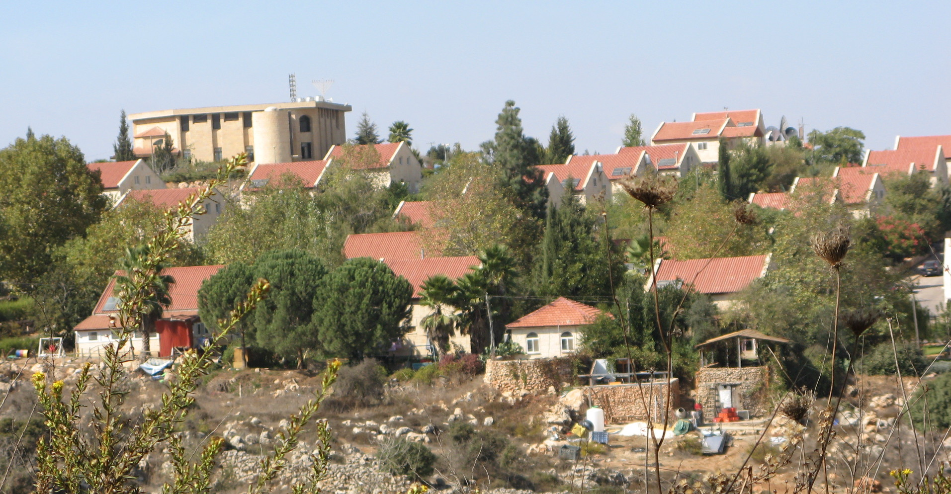 Ofra taken from Givat Zvi